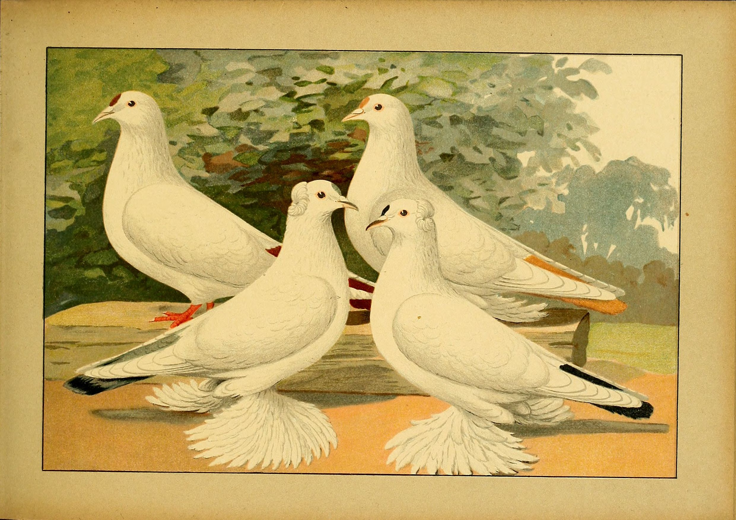 Deutsch